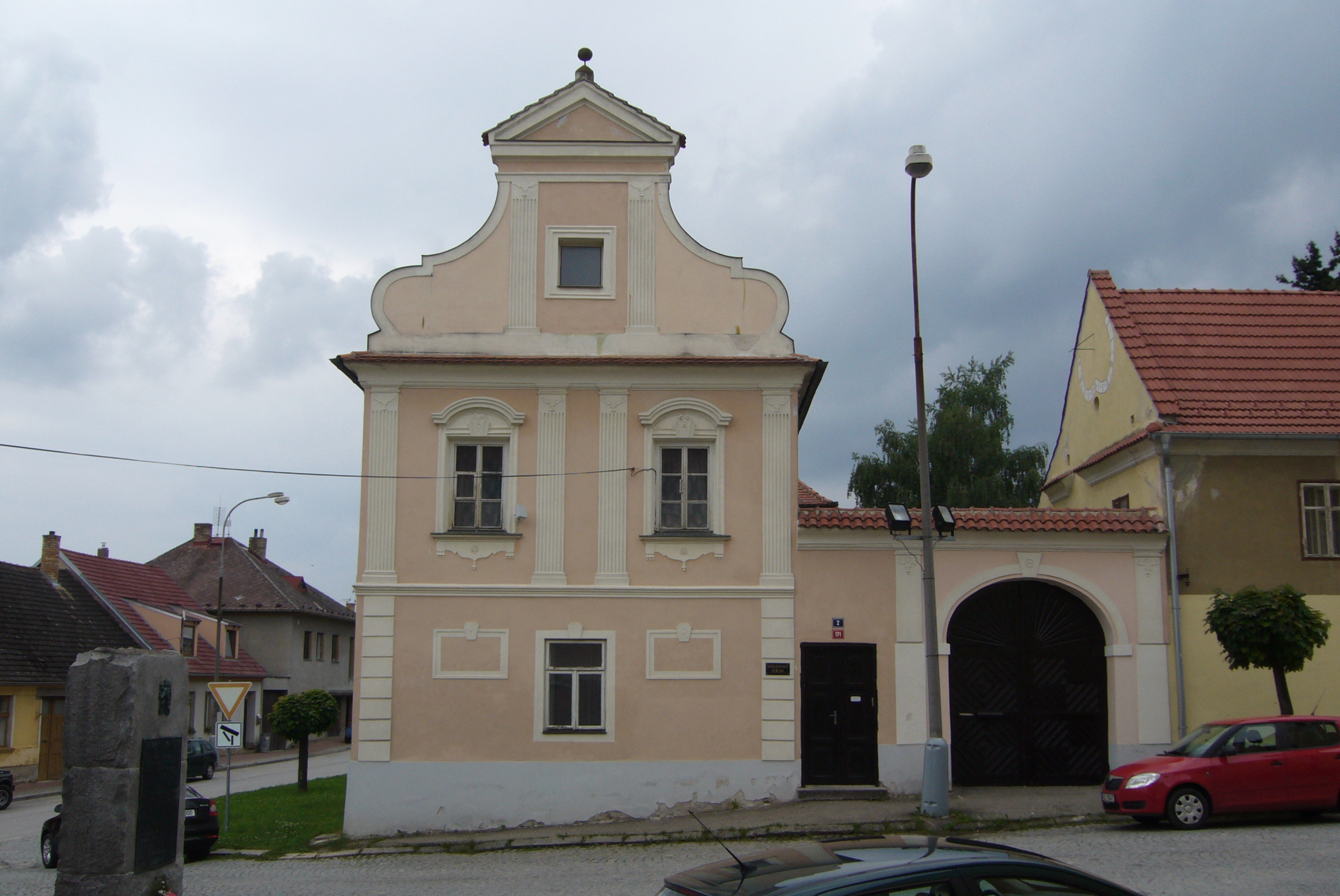 Fara, Lišov 171